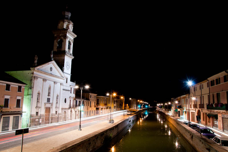 Vista notturna su Battaglia terne ed il Canale Battaglia.